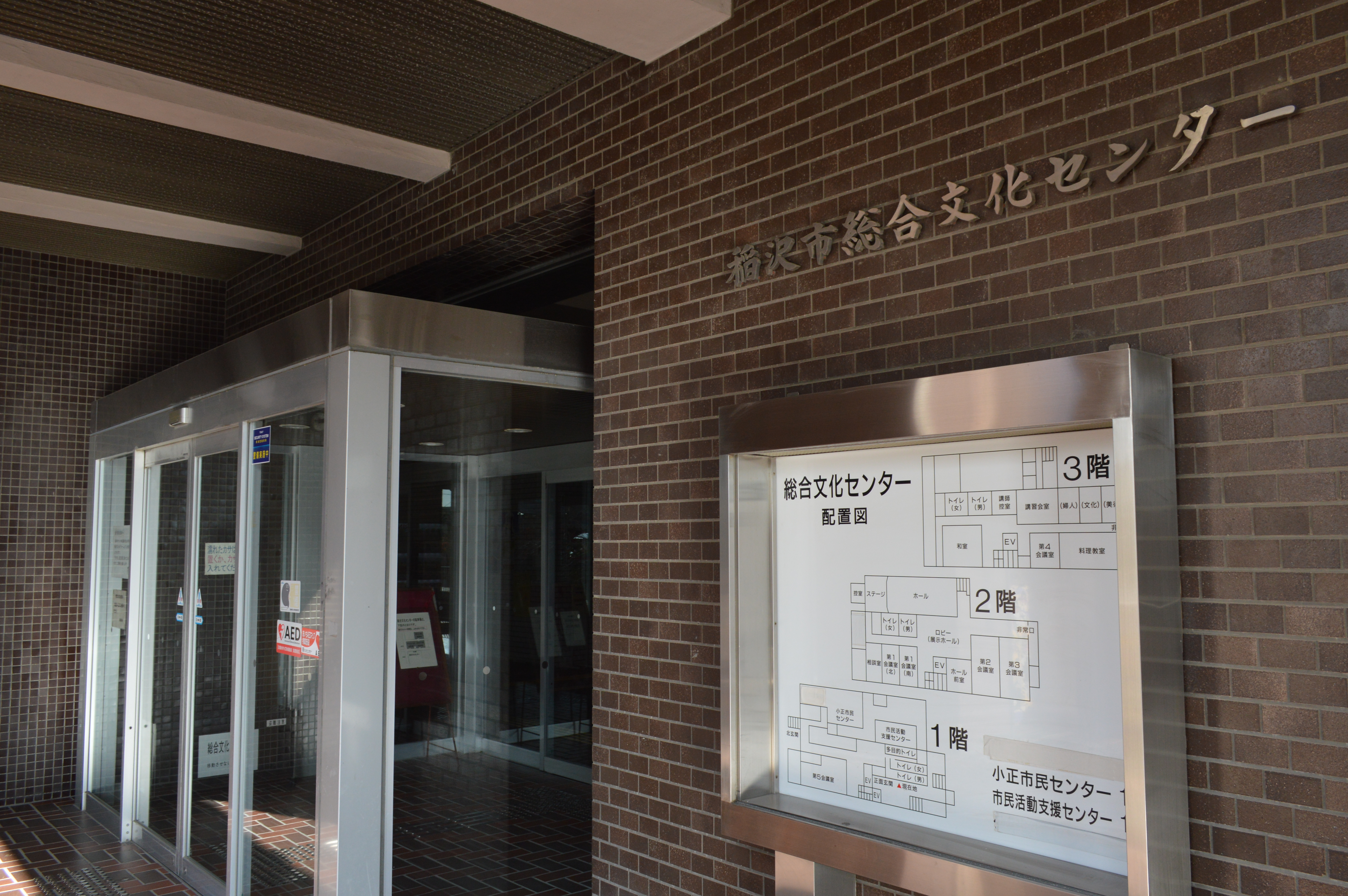 稲沢市の国府宮団地（国府宮住宅）にある稲沢市総合文化センター。